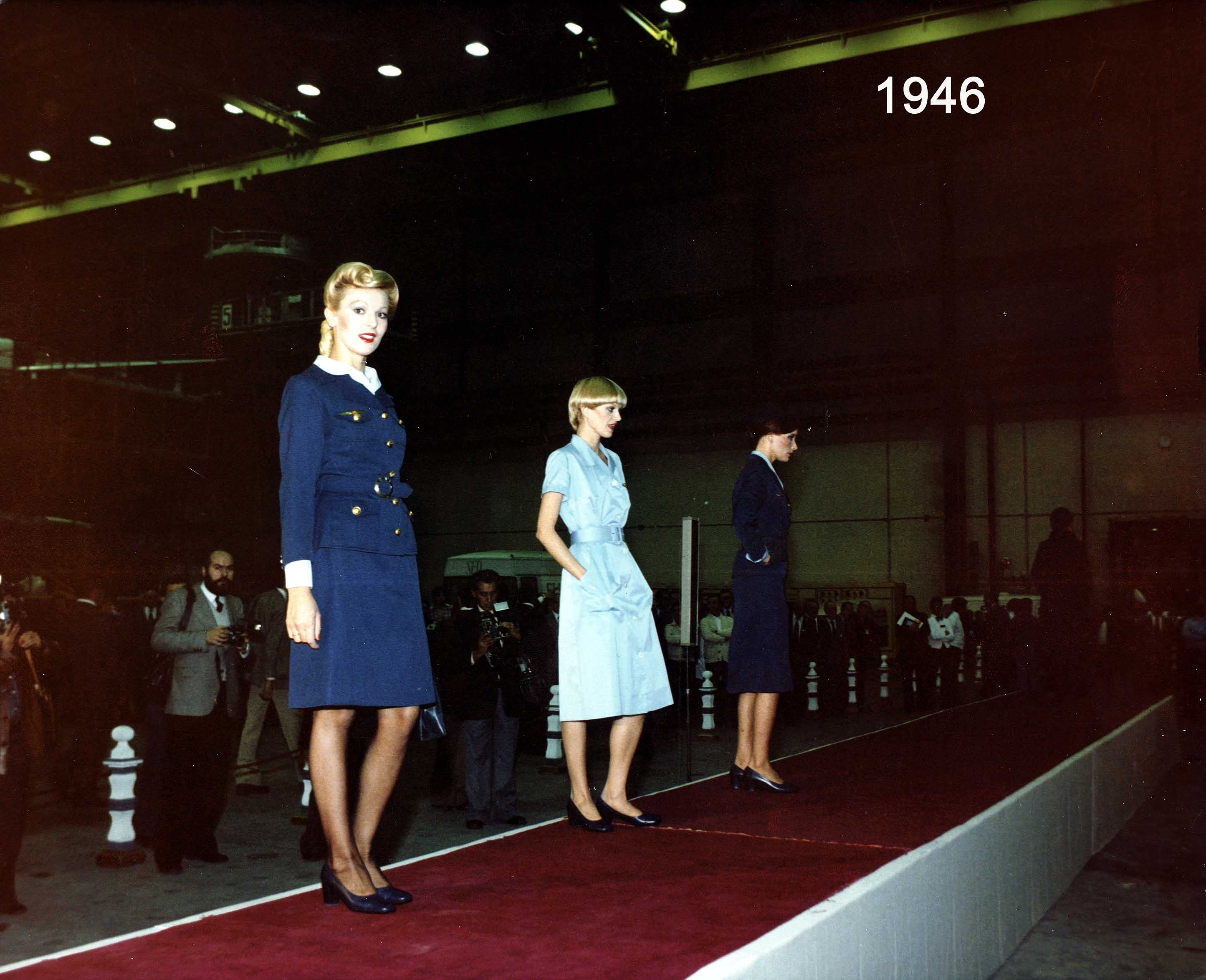 1946 uniform - 2 1946 Uniform - 2 1946 uniforme- 2 Uniformes de 1946